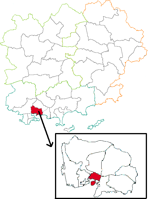 Situation du canton dans la département du Var (83), France